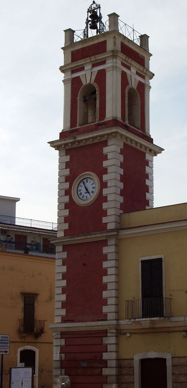 Torre dell'orologio di Cerignola (FG).